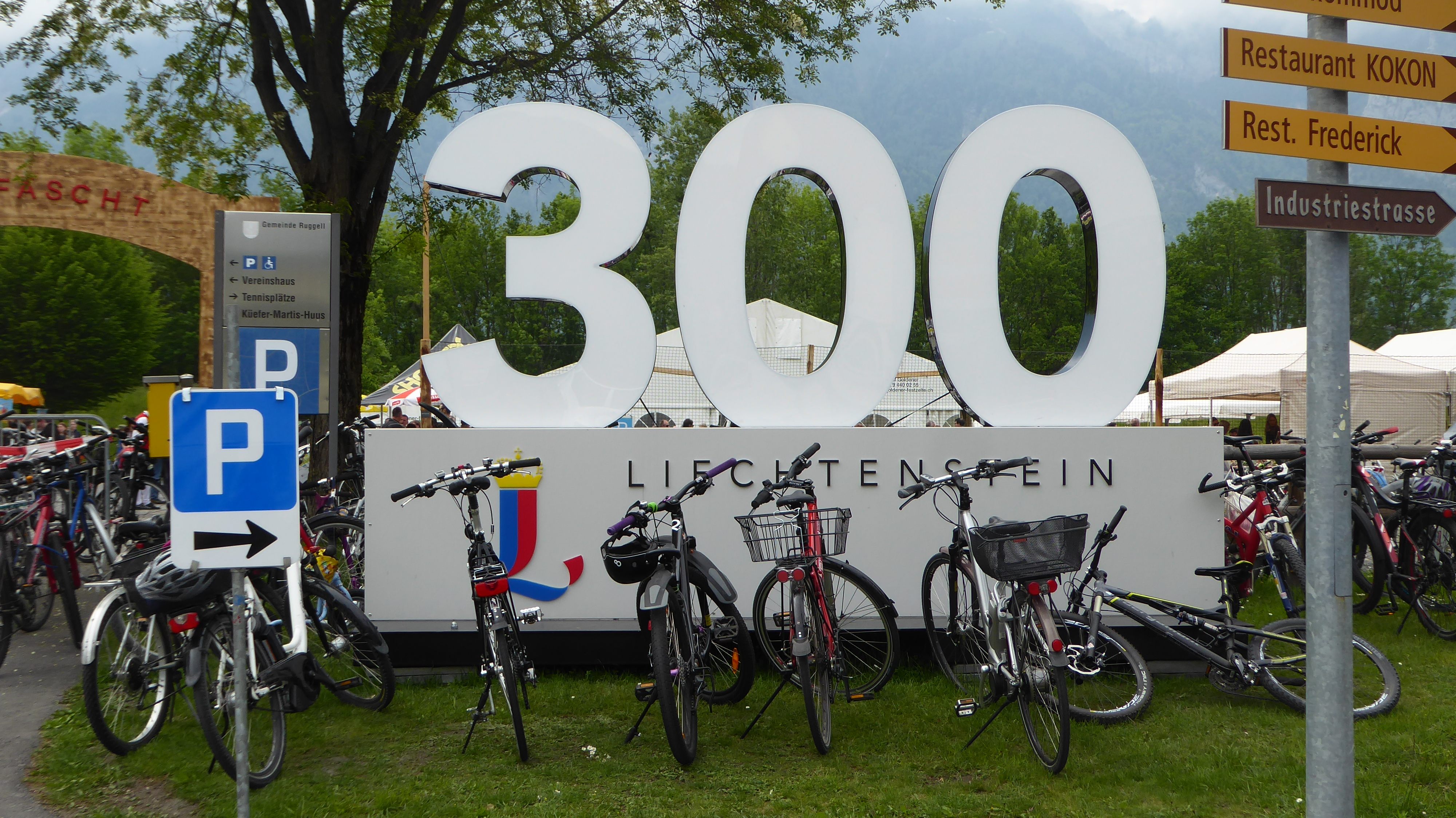 Fahrräder von Teilnehmern der 300-Jahr-Feier Fürstentum Liechtenstein in Ruggell